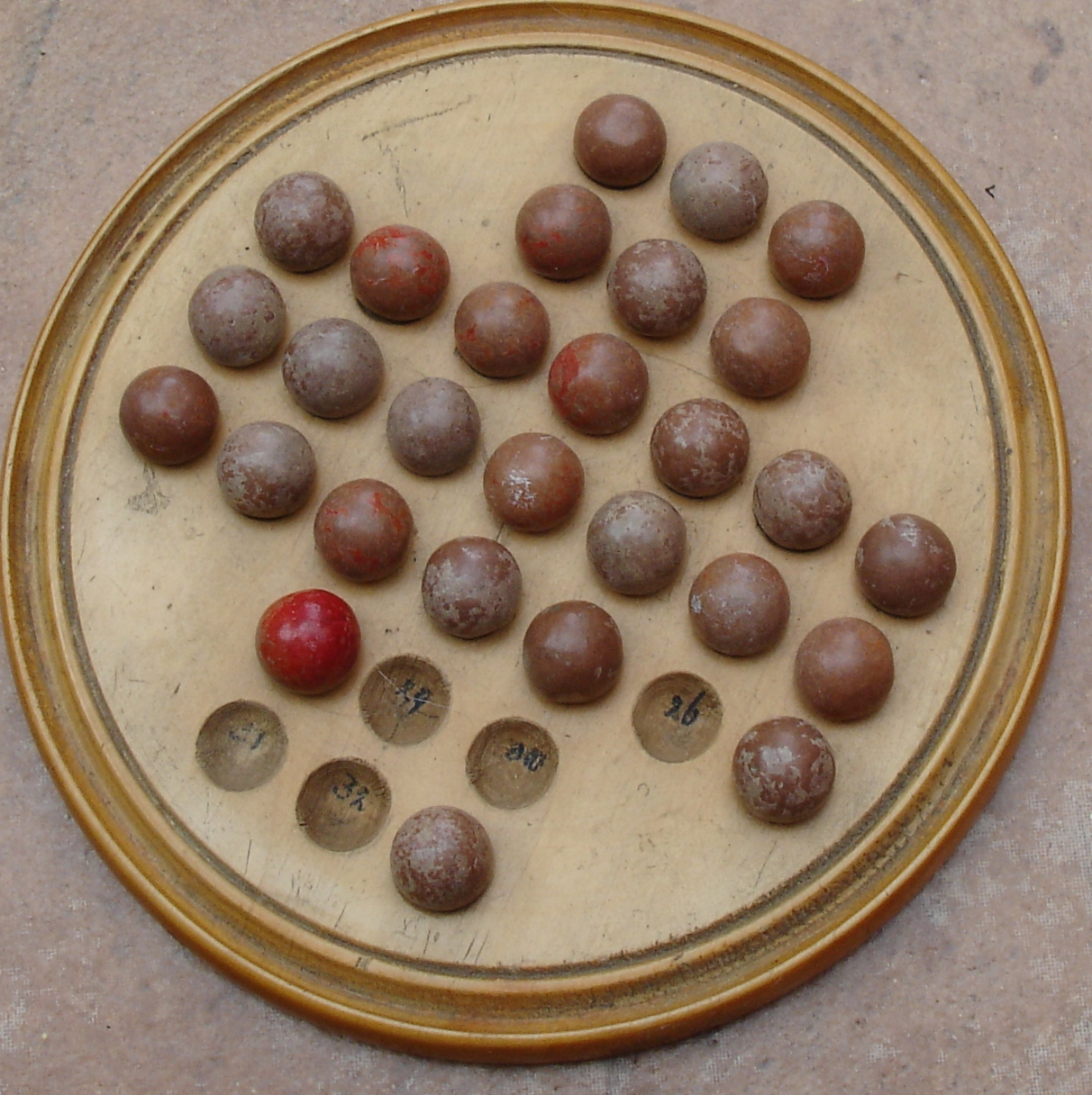 Solitaire